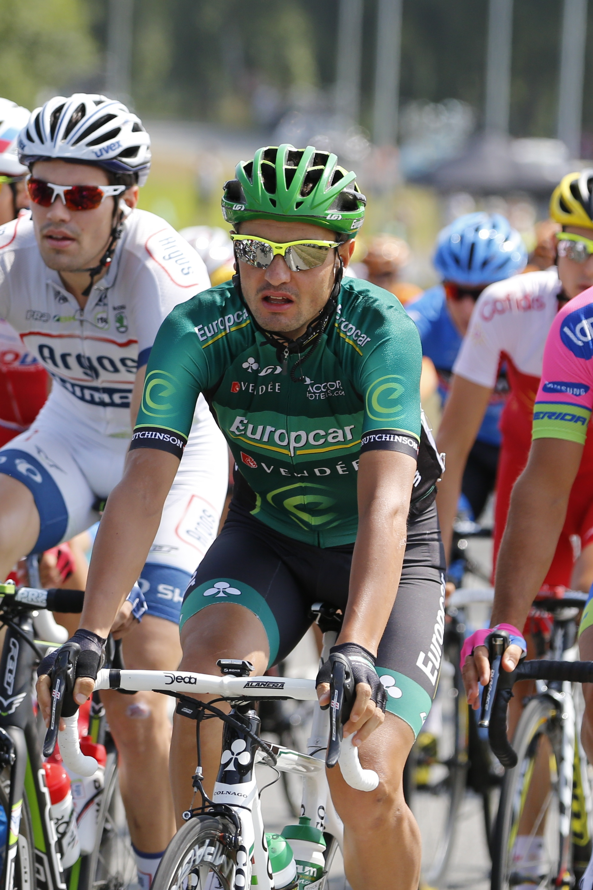 Davide Malacarne au départ de la 12e étape du Tour de France 2013 sur la Route nationale 12 à Javené.